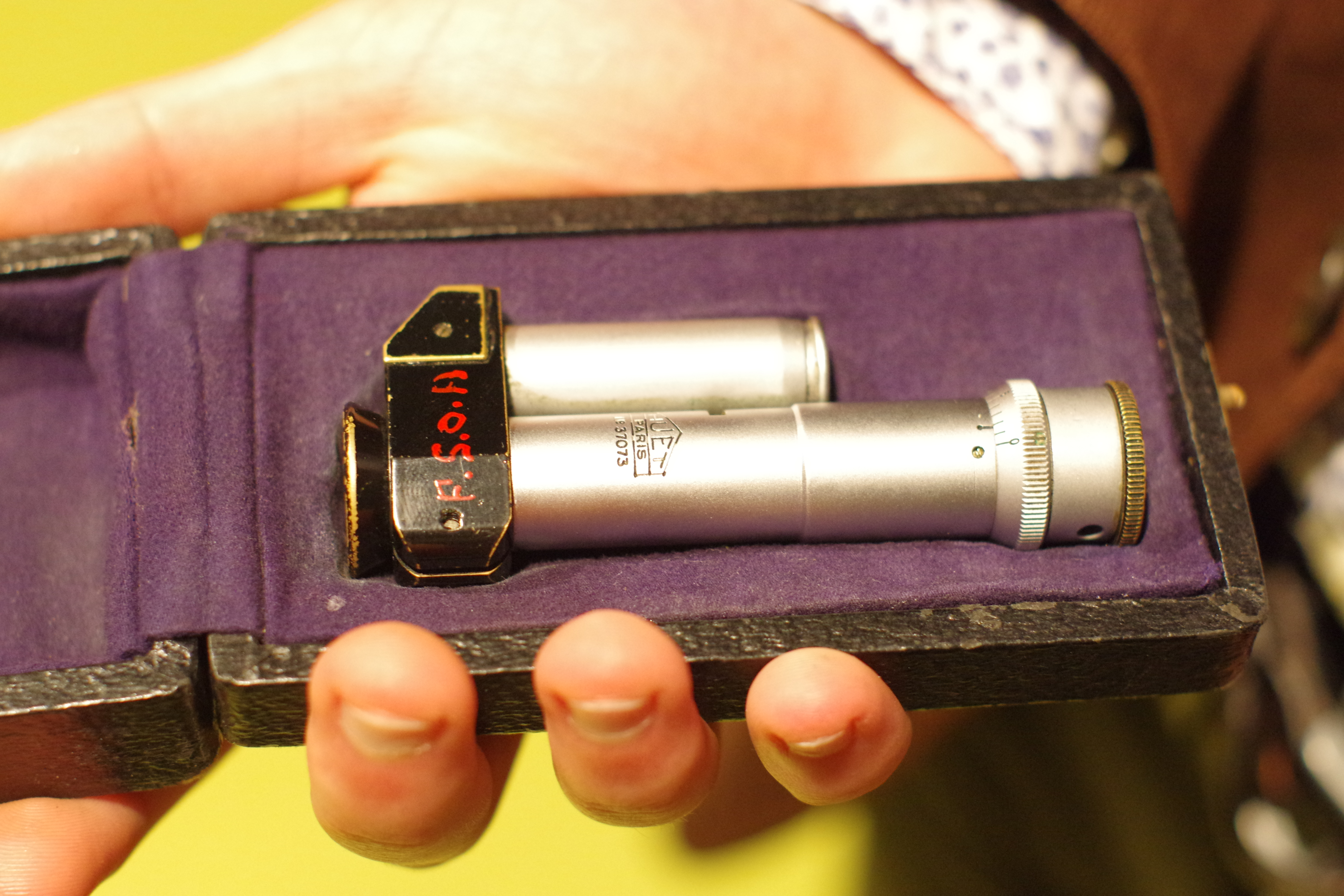 Spectromètre de poche, SupOptique